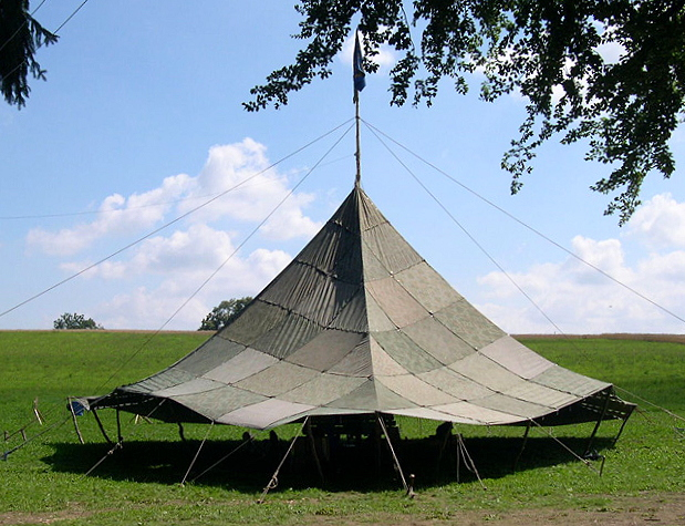 A Sarasani tent